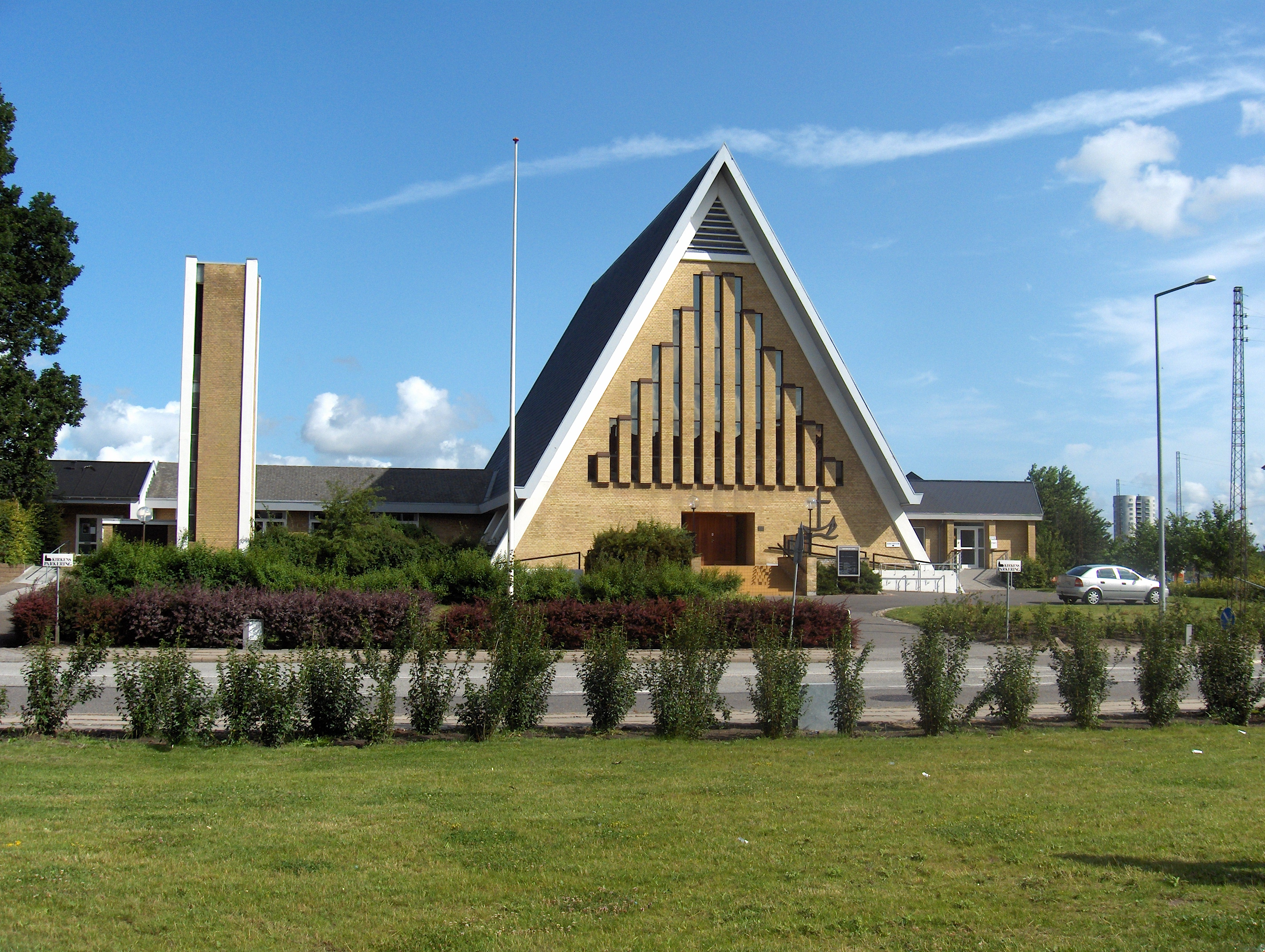 Vesterkær Kirke i Aalborg